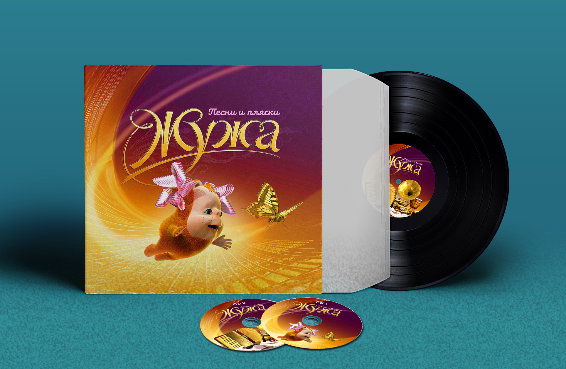 Обложка новой виниловой пластинки "Жужа. Песни и пляски" детского сказочного сериала "Жужа".